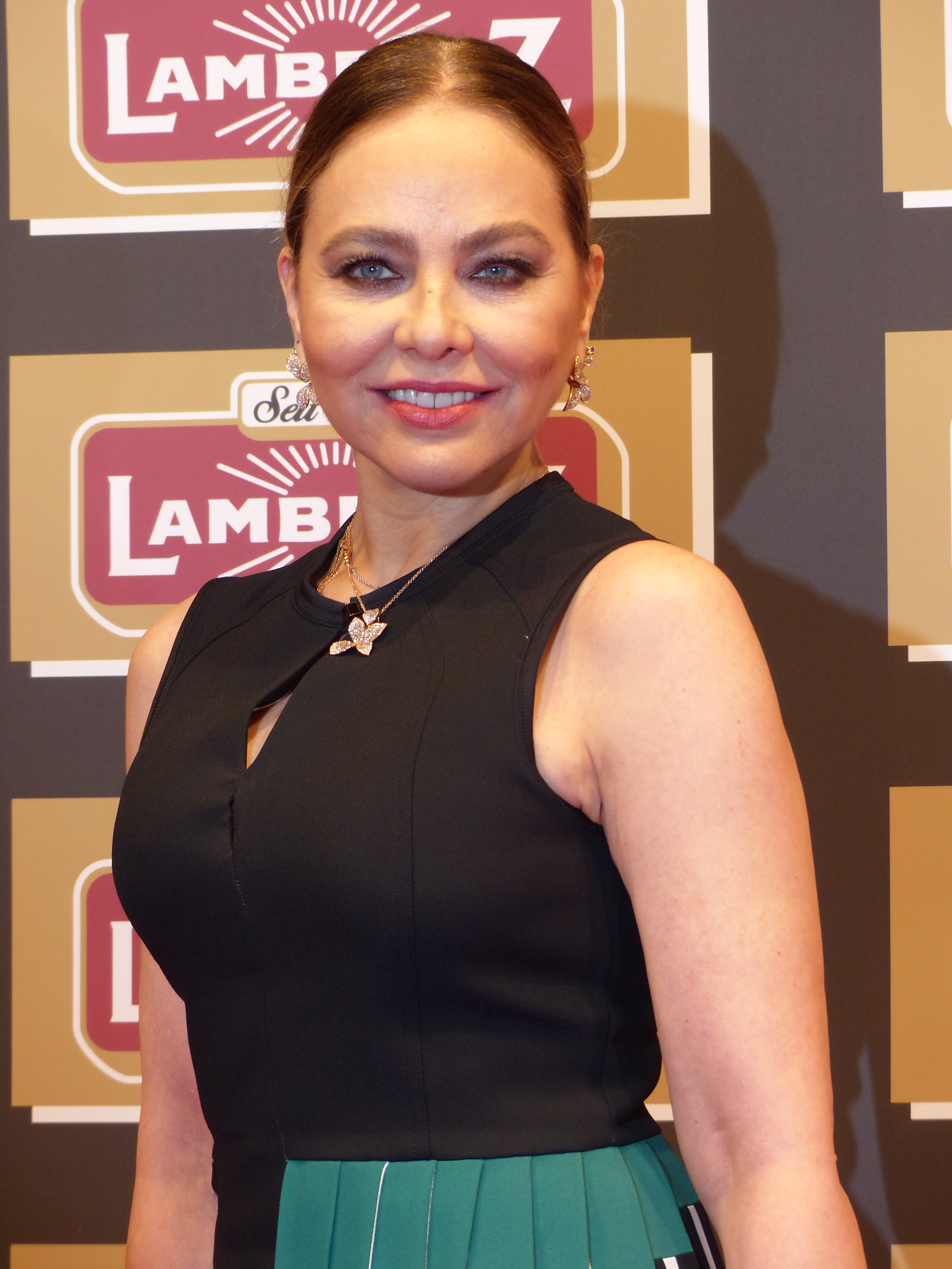 Ornella Muti bei der Lambertz Monday Night, im Februar 2016.